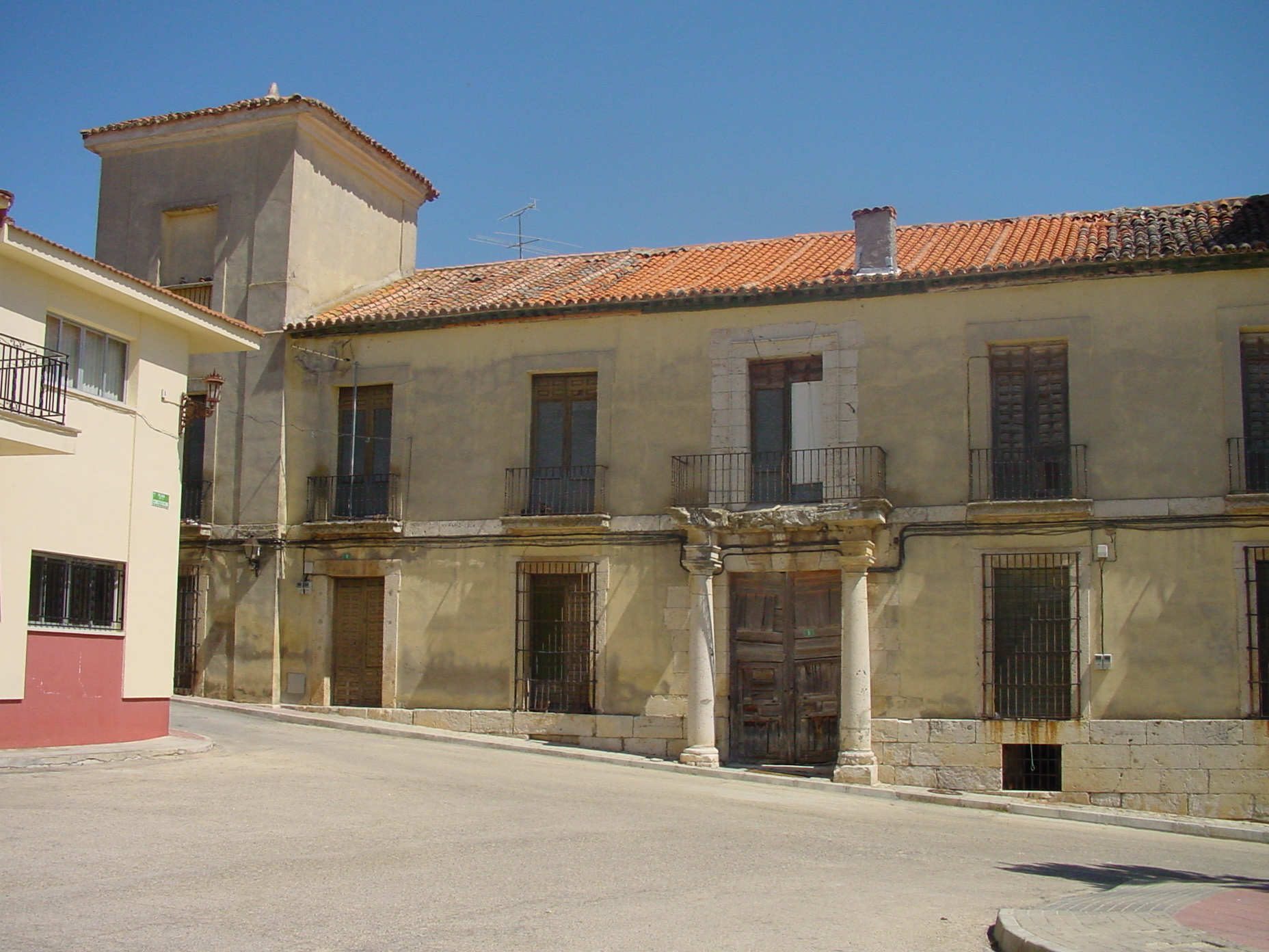 Fachada de casa en Corpa.